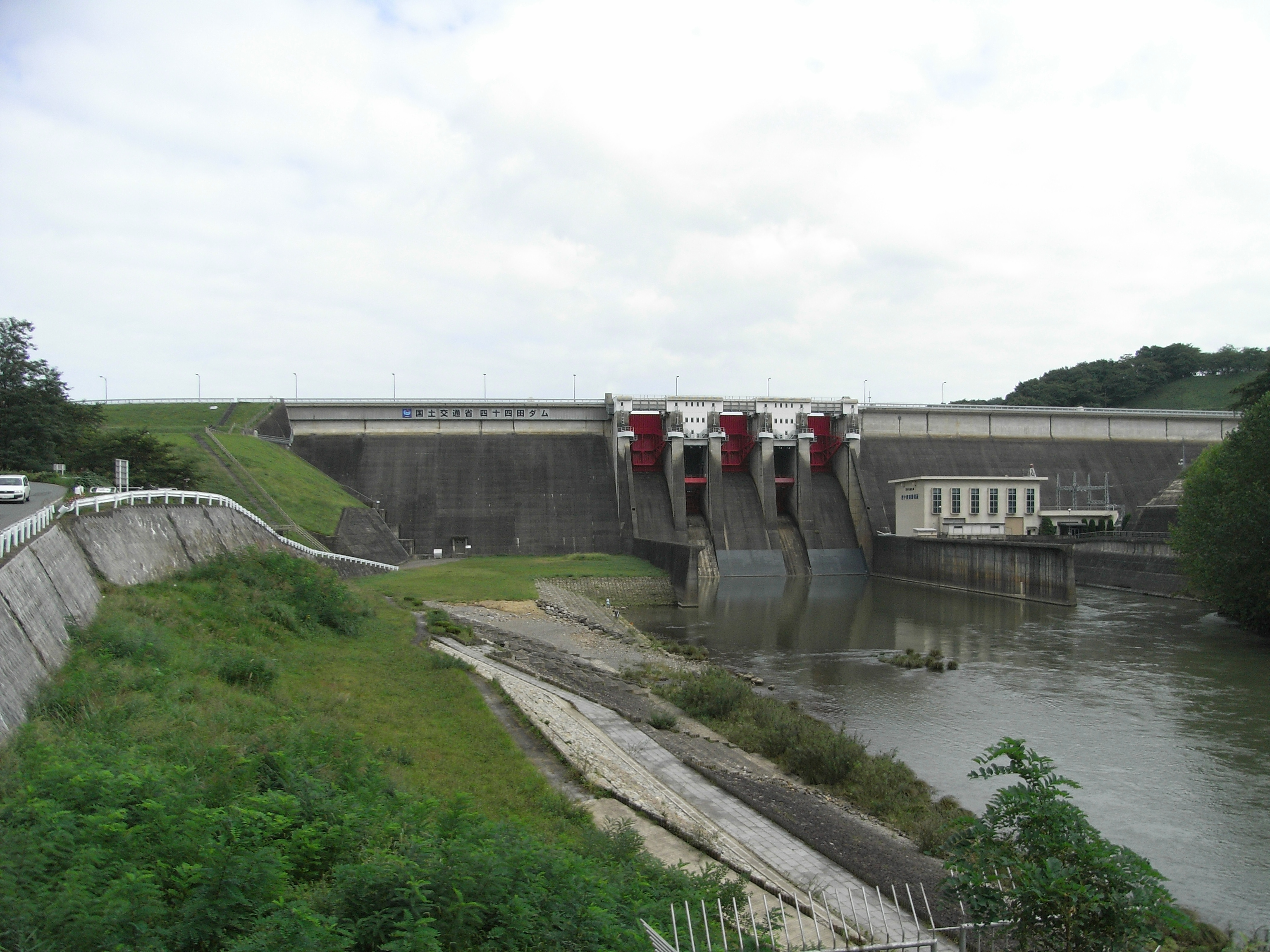 Dam